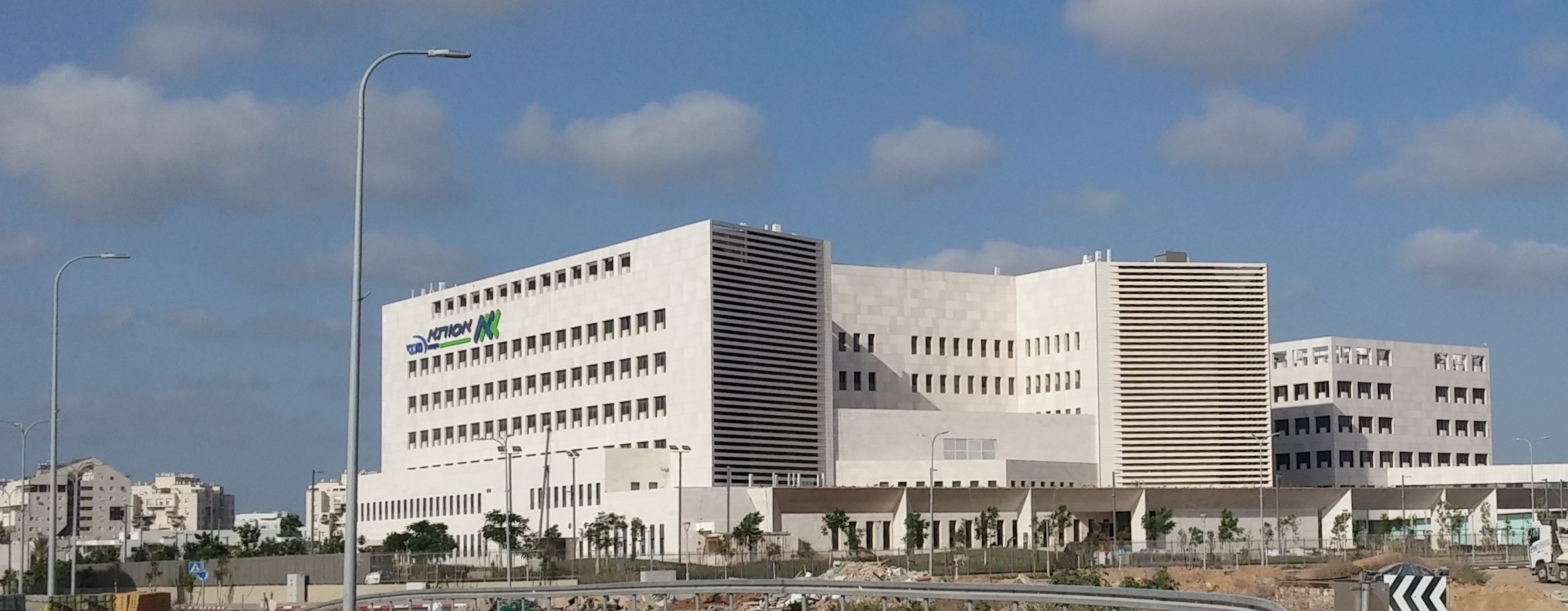 אסותא אשדוד